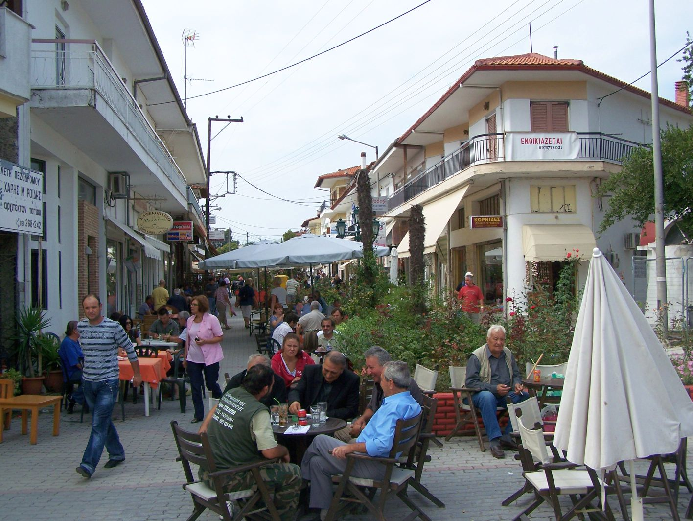 Die Fußgängerzone von Kassandria